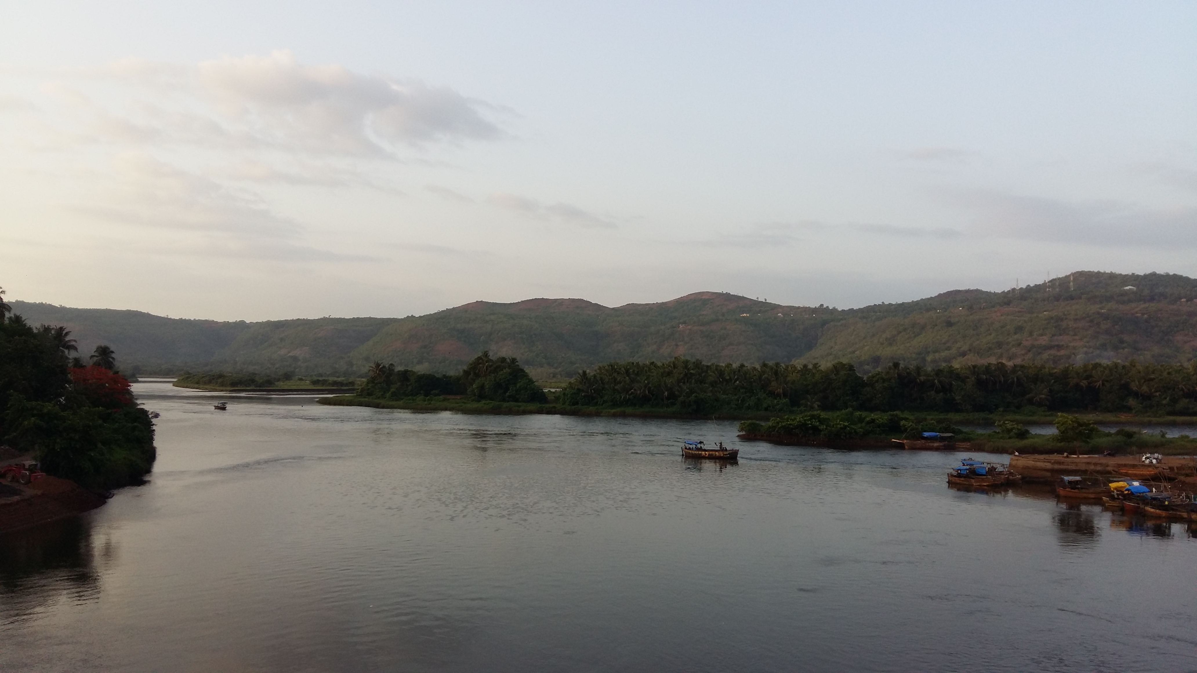 वासिष्ठी नदीची खाडी, गोवळकोट